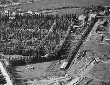 Strømsveien, Tvetenveien, Brynshøgda. Timms Reperbane. Østre gravlund. (Flyfoto).